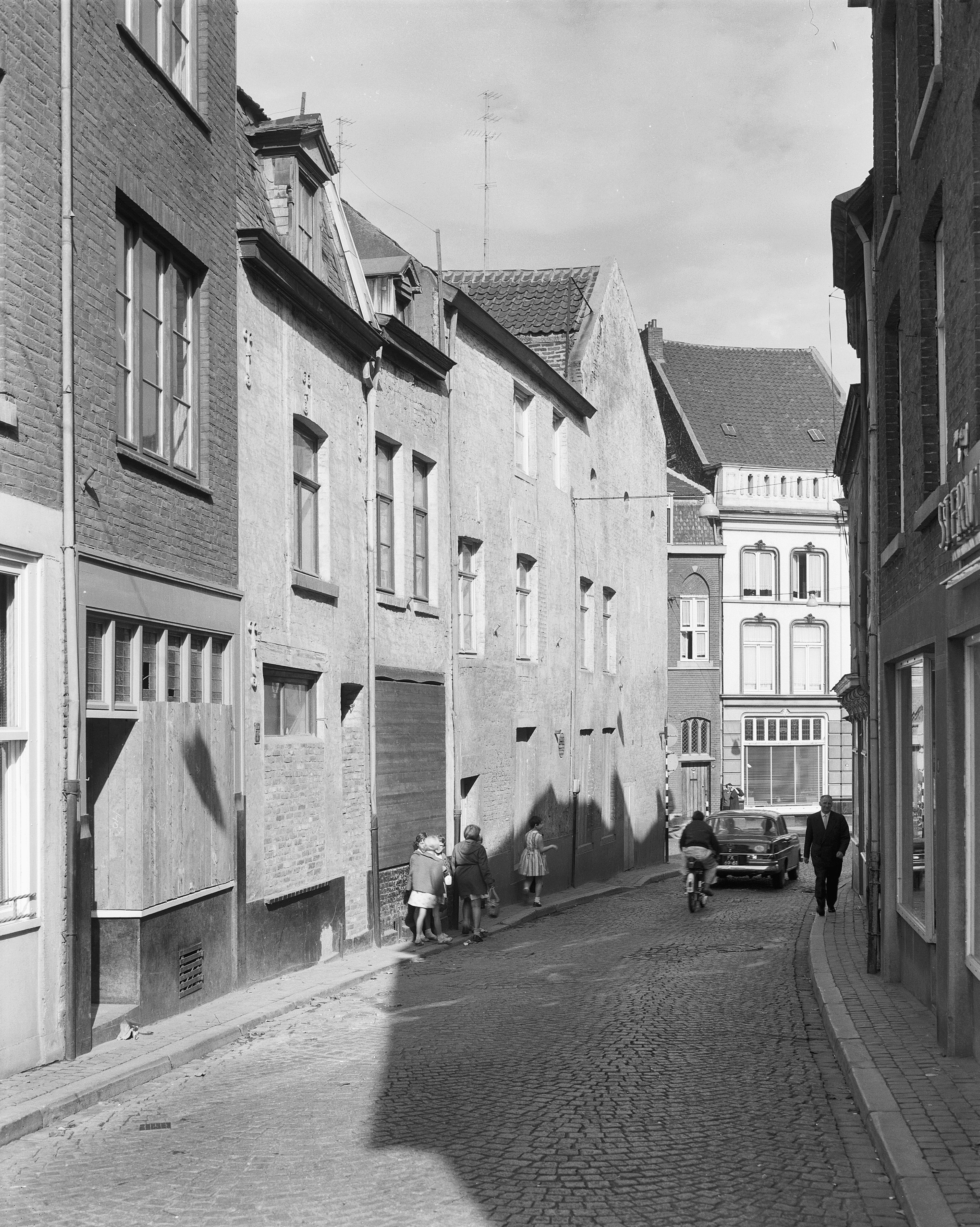 21, zijgevel - straatoverzicht